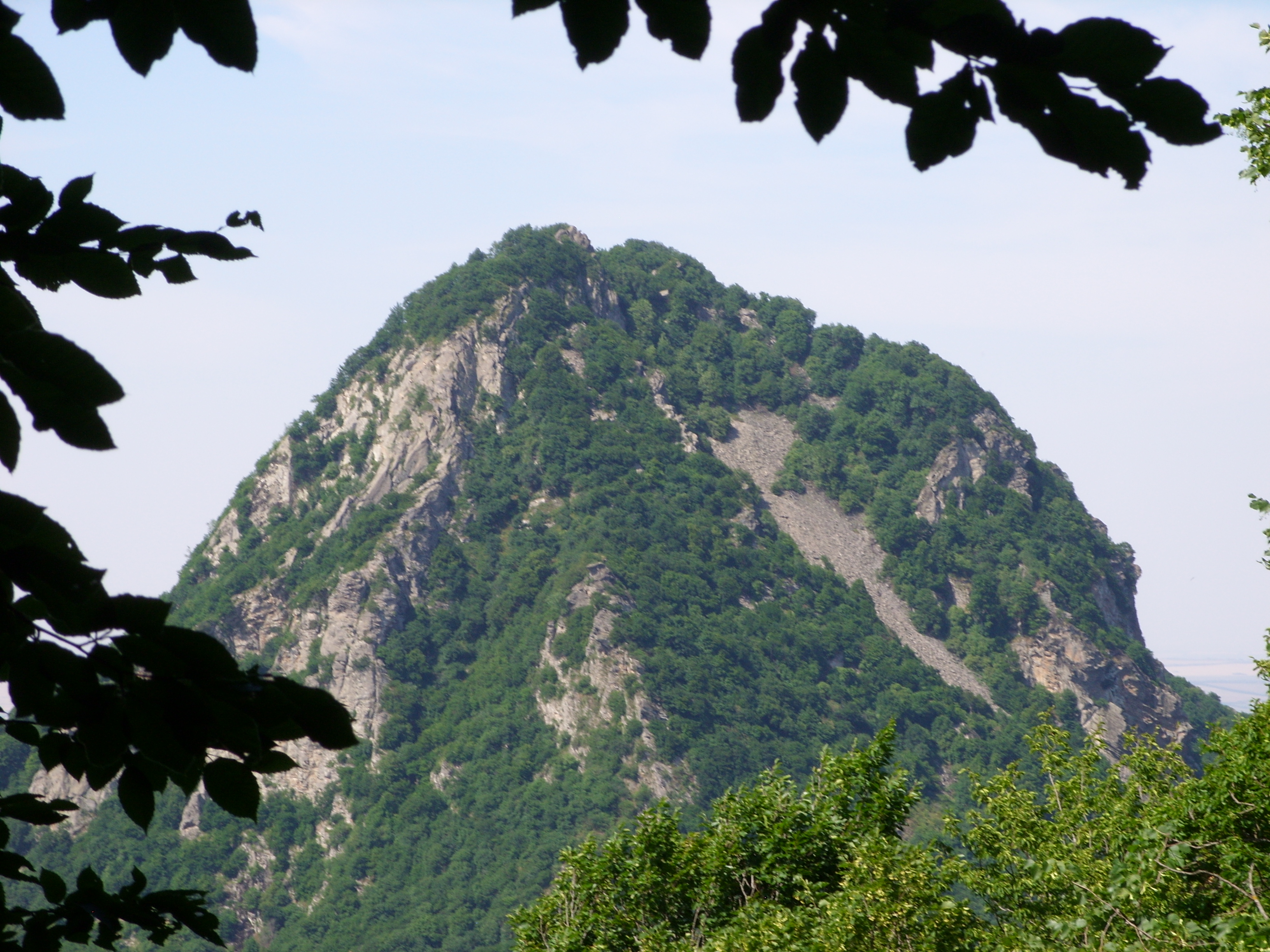 снимок июля 2009 г.